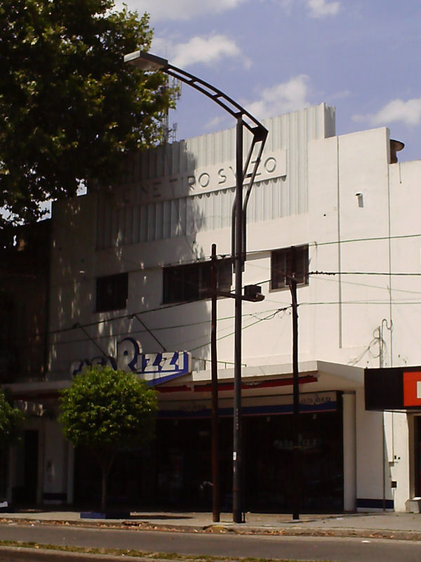 Cine Tiro Suizo 17-01-2009